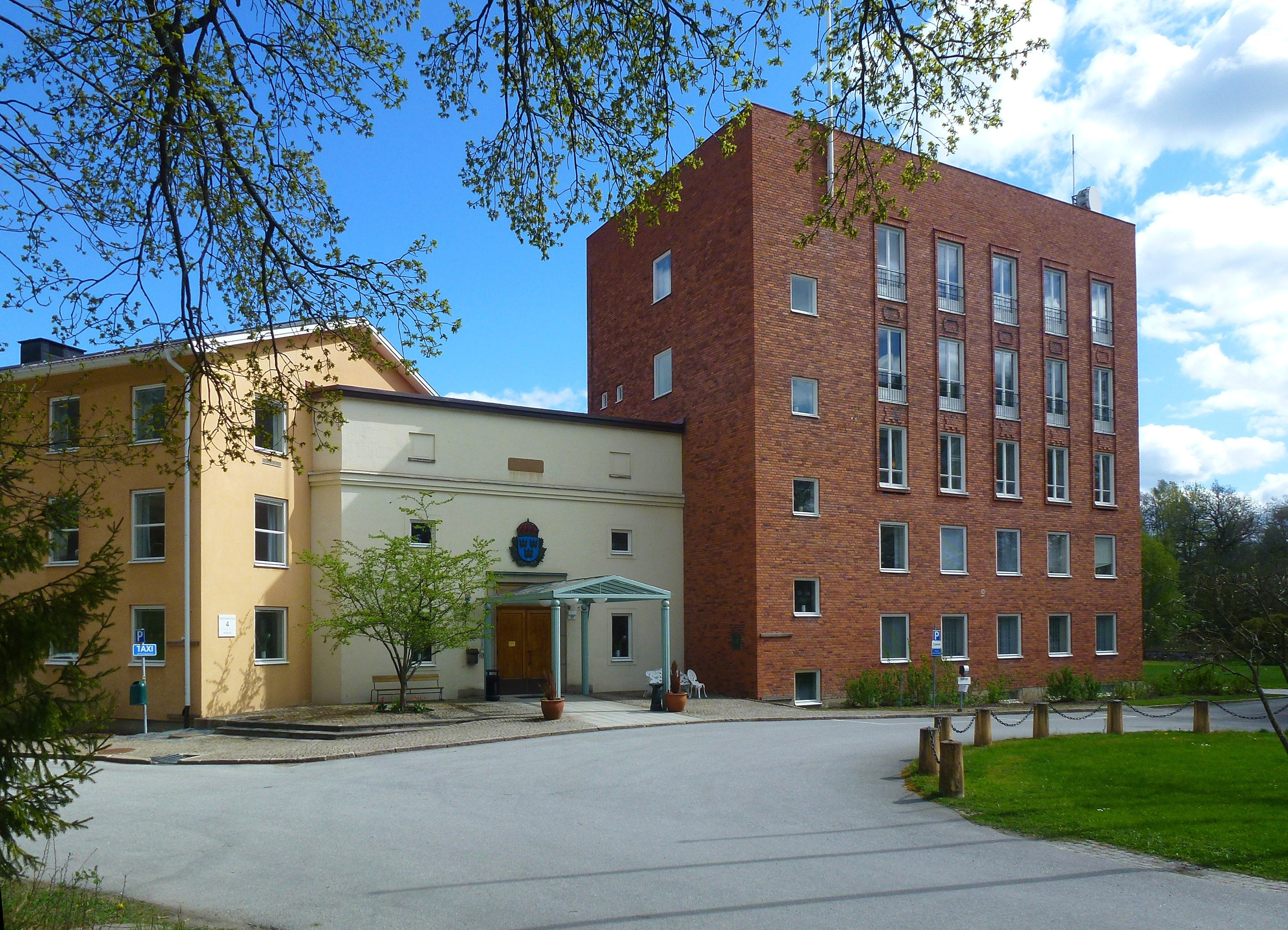 Polishögskolan, Sörentorp. Före detta kanslibyggnaden för Svea livgarde och polisen